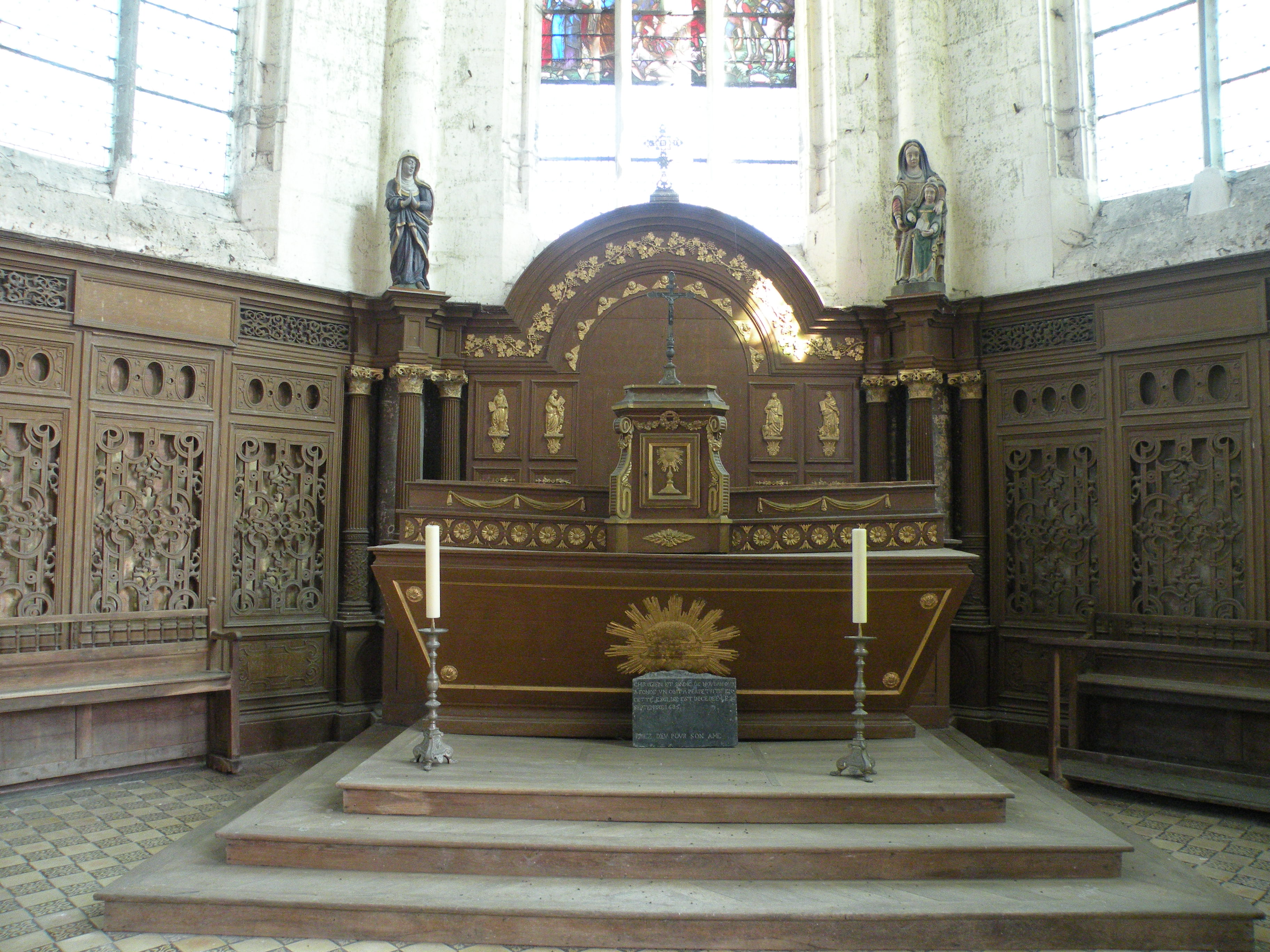 Intérieur de l'église Saint-Denis d'Hodenc-en-Bray